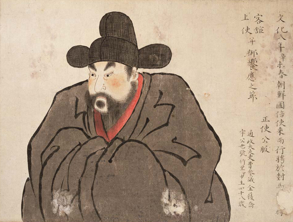 朝鮮通信使人物図（文化8年来聘朝鮮通信使図）中 正使 金履喬の画像(黒団領着用)